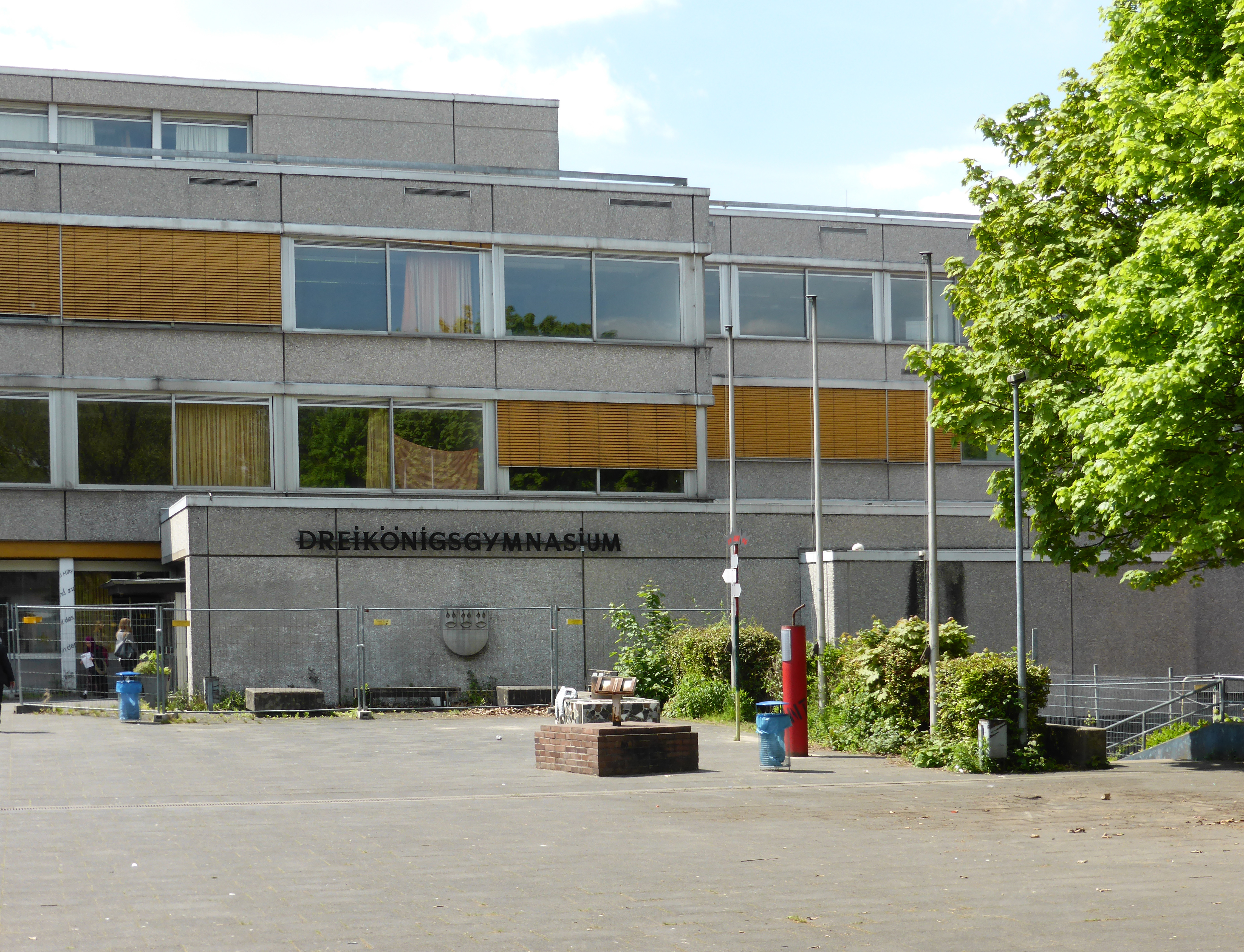 Stolperstein: Dreikönigsgymnasium Escher Straße 247, Köln.